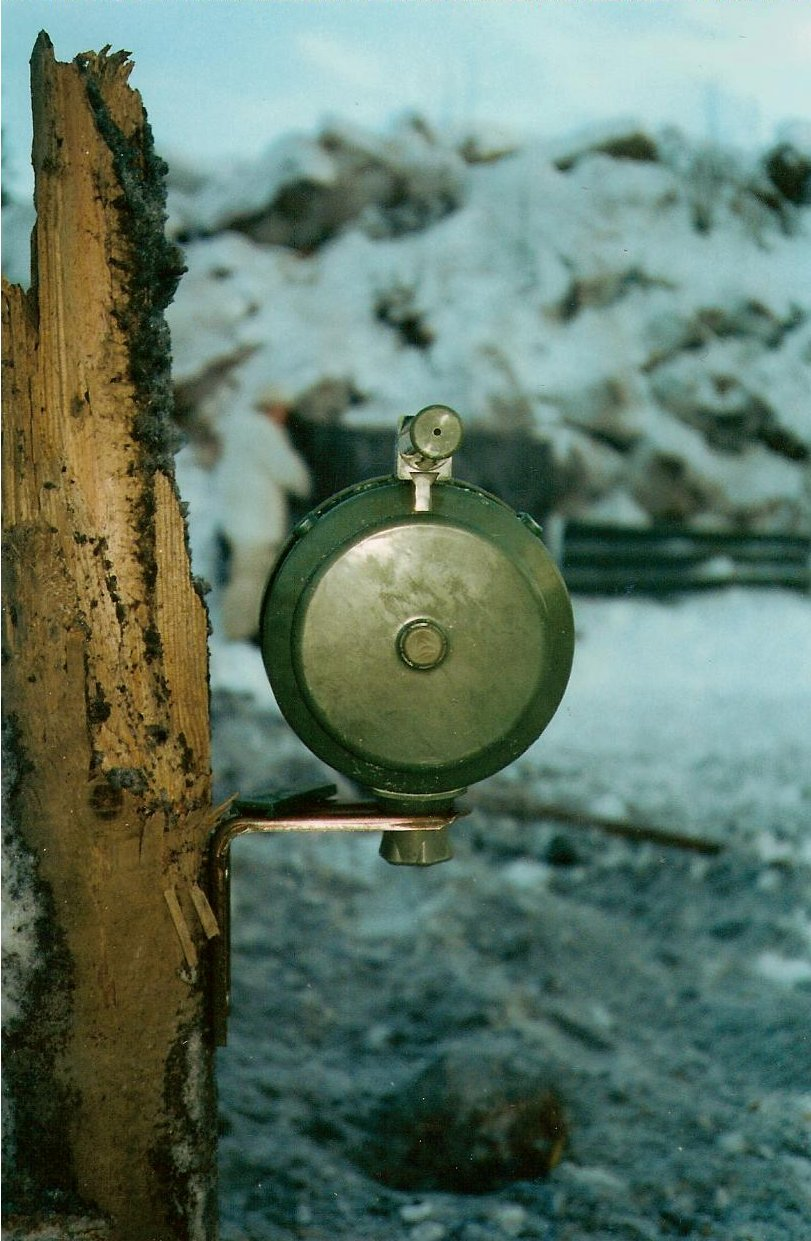 Finnish KM87 (Kylkimiina 87) off-route mine.